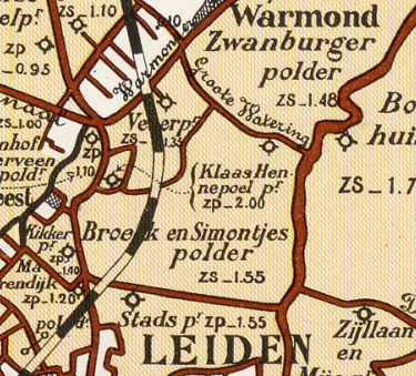 Broek_en_Simontjes polder